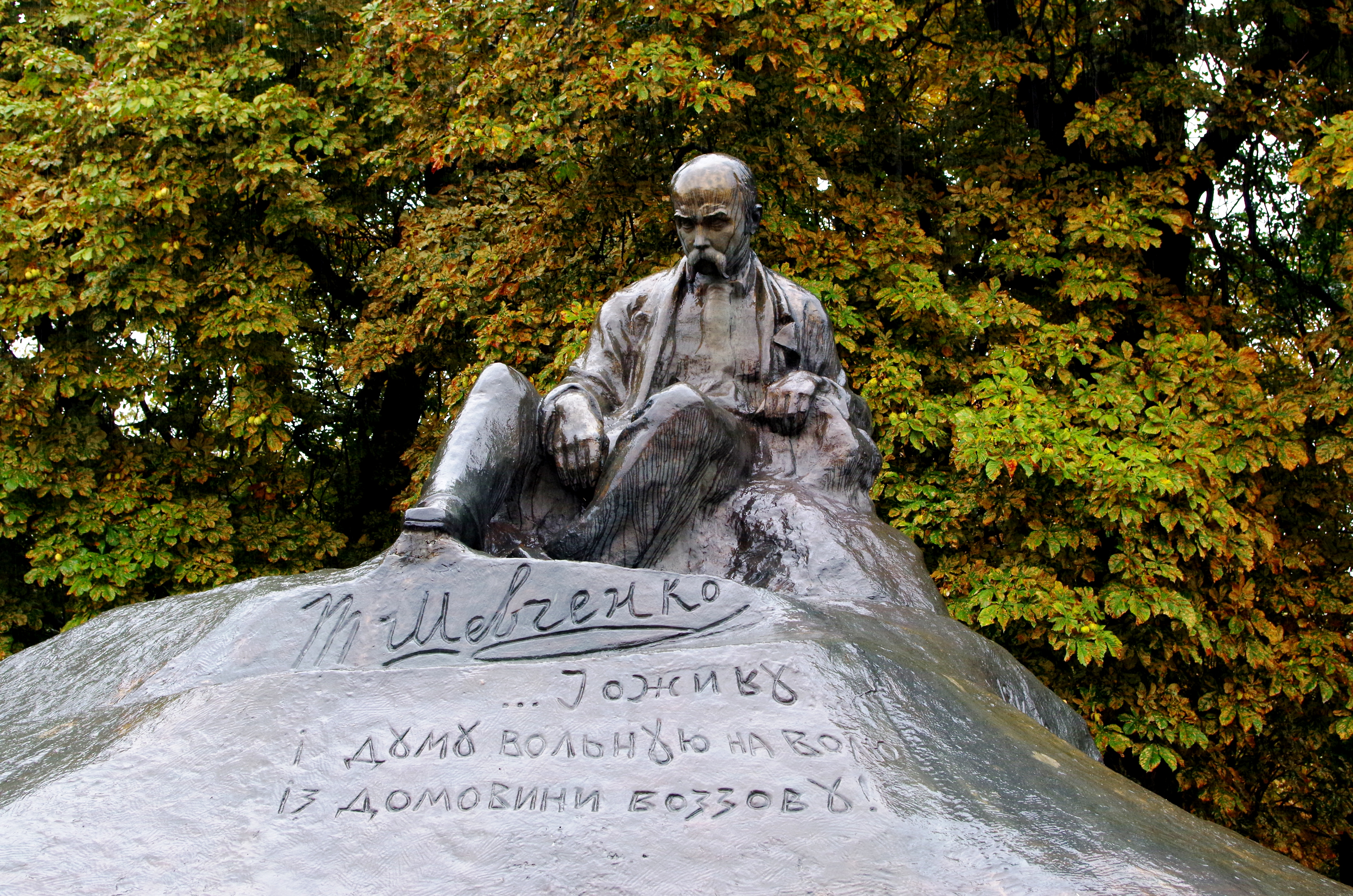 Пам'ятник поету Т. Г. Шевченку, Ромни, бул. Т. Шевченка, 12